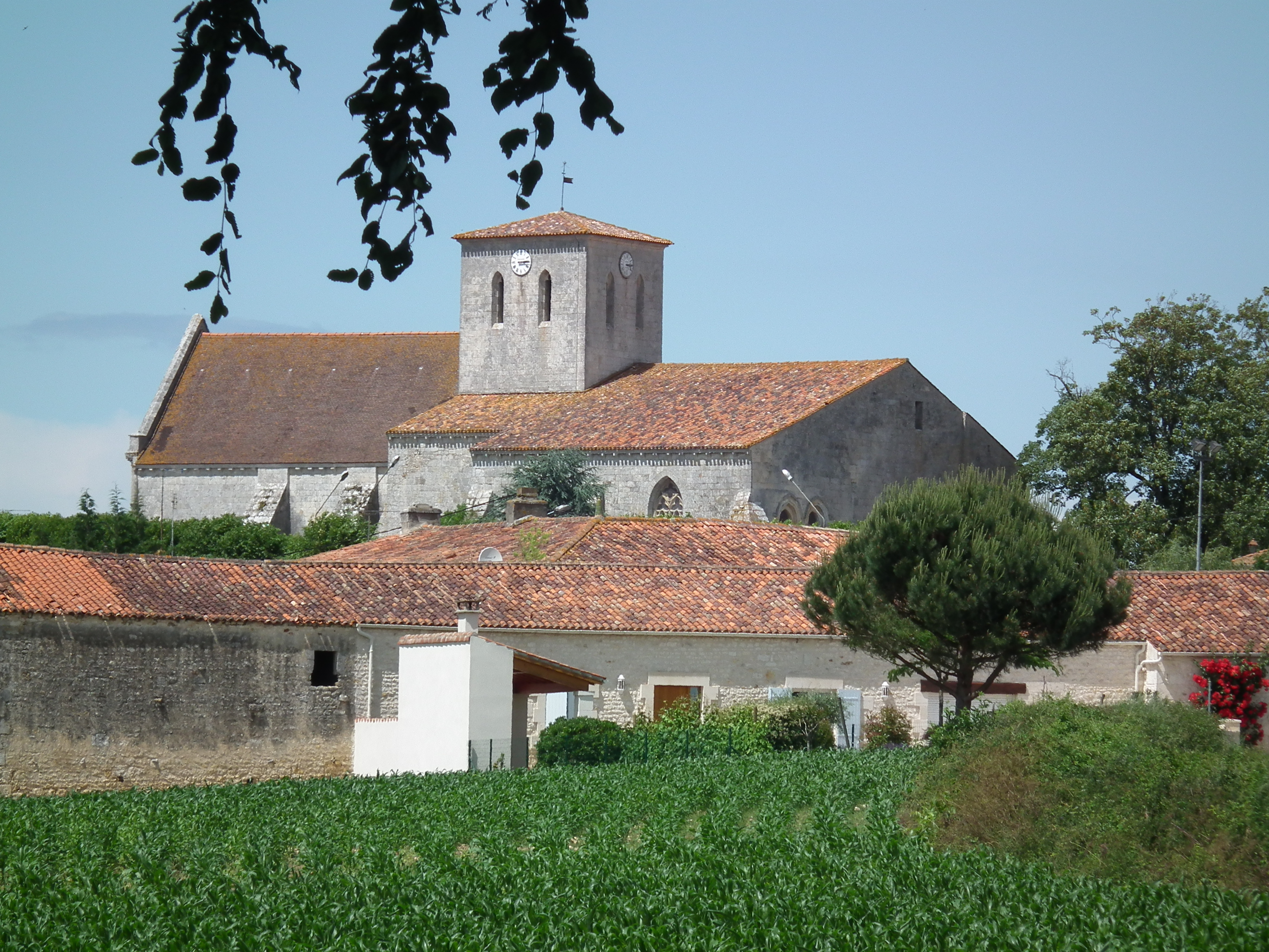 Vue de Meursac